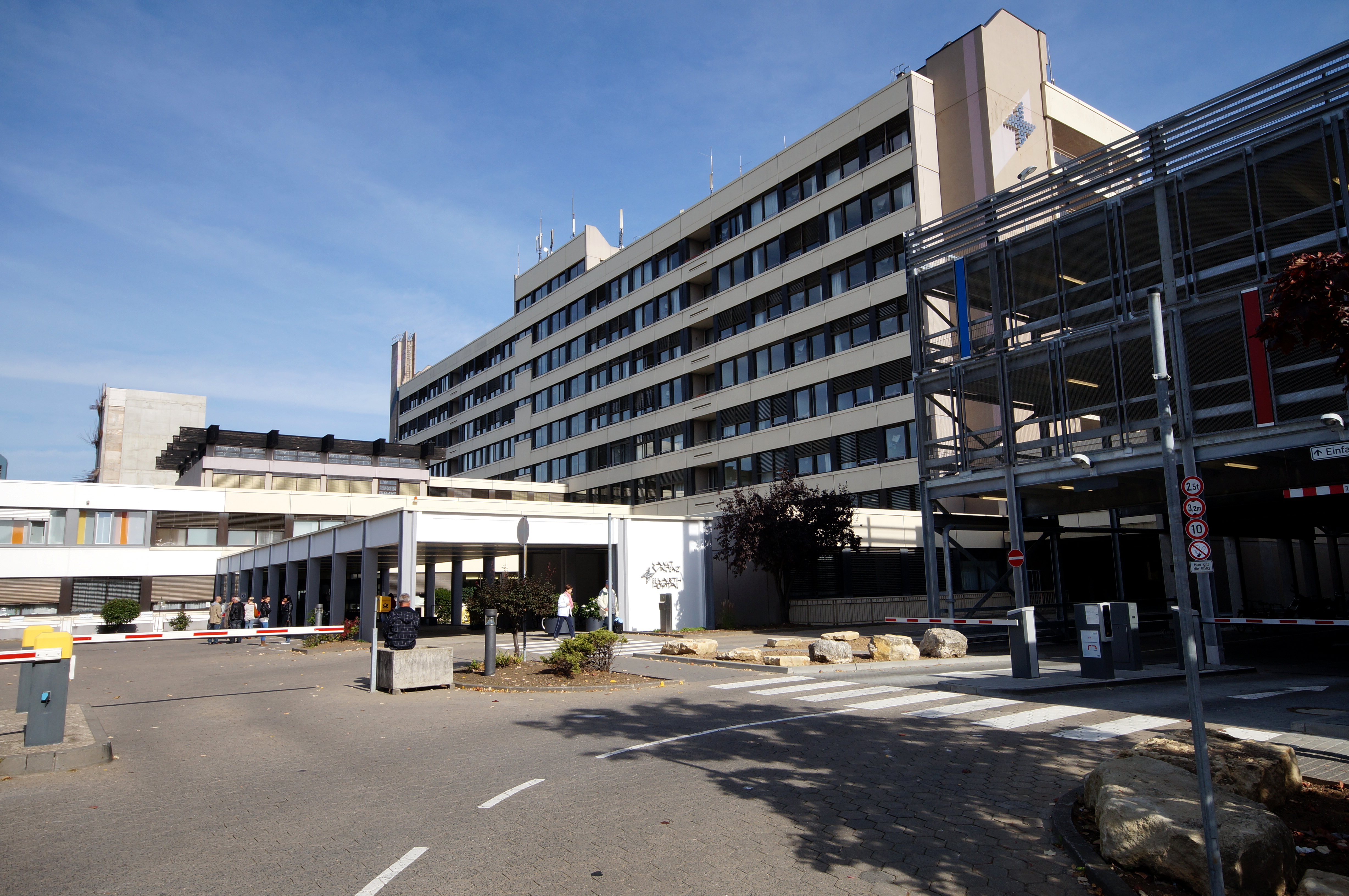 Haupteingang des Katholischen Klinikums Mainz (St. Vincenz und Elisabeth Hospital) in Mainz-Oberstadt.